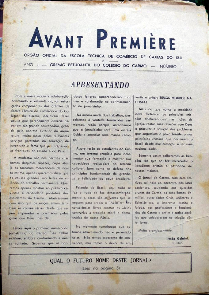 Capa da primeira edição do Jornal Avant Premiere do Colégio do Carmo